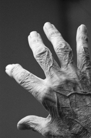 Altenpflege durchgeführt von einem Zivildienstleistenden in München